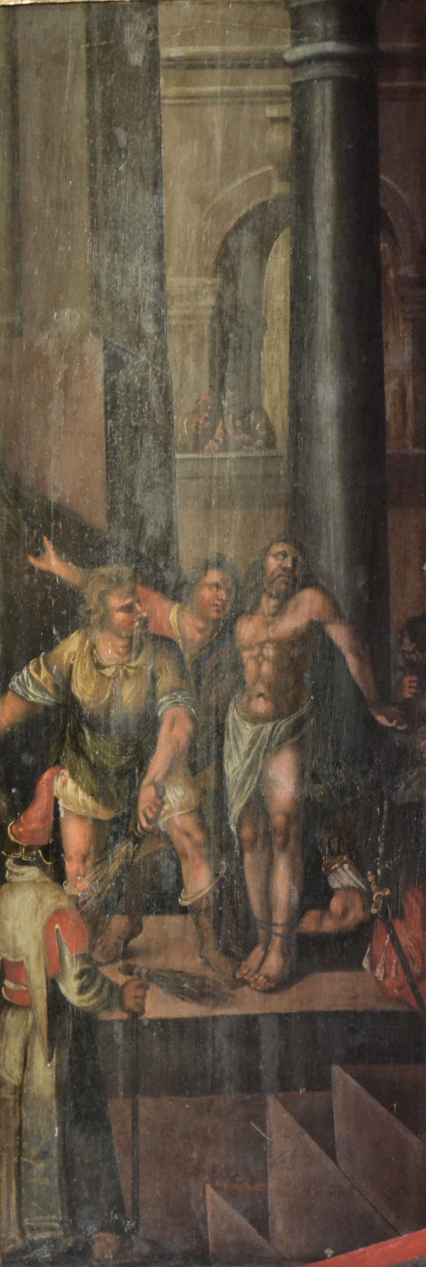 Marianowo - zespół klasztorny cystersów